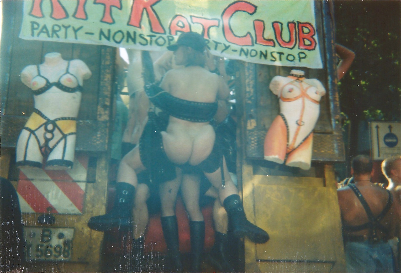 Wagen des KitKat-Clubs in der Loveparade 1995 am Tauentzien